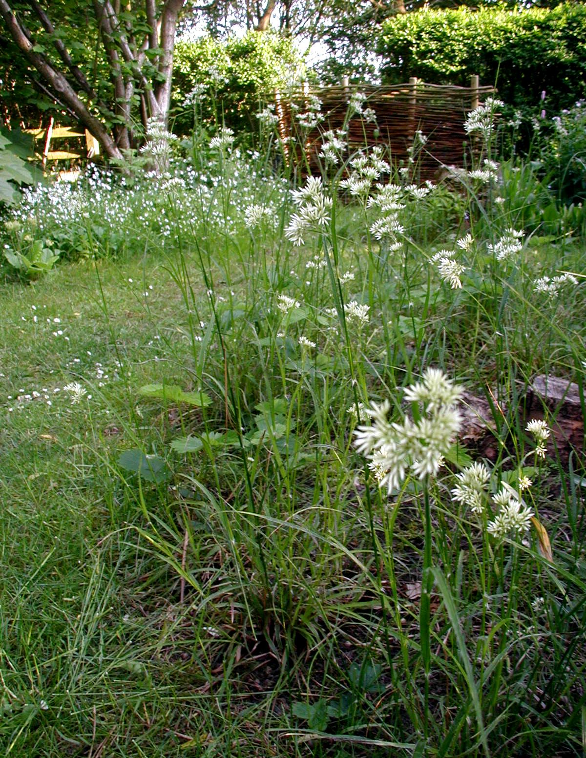 Luzula nivea: Habit.